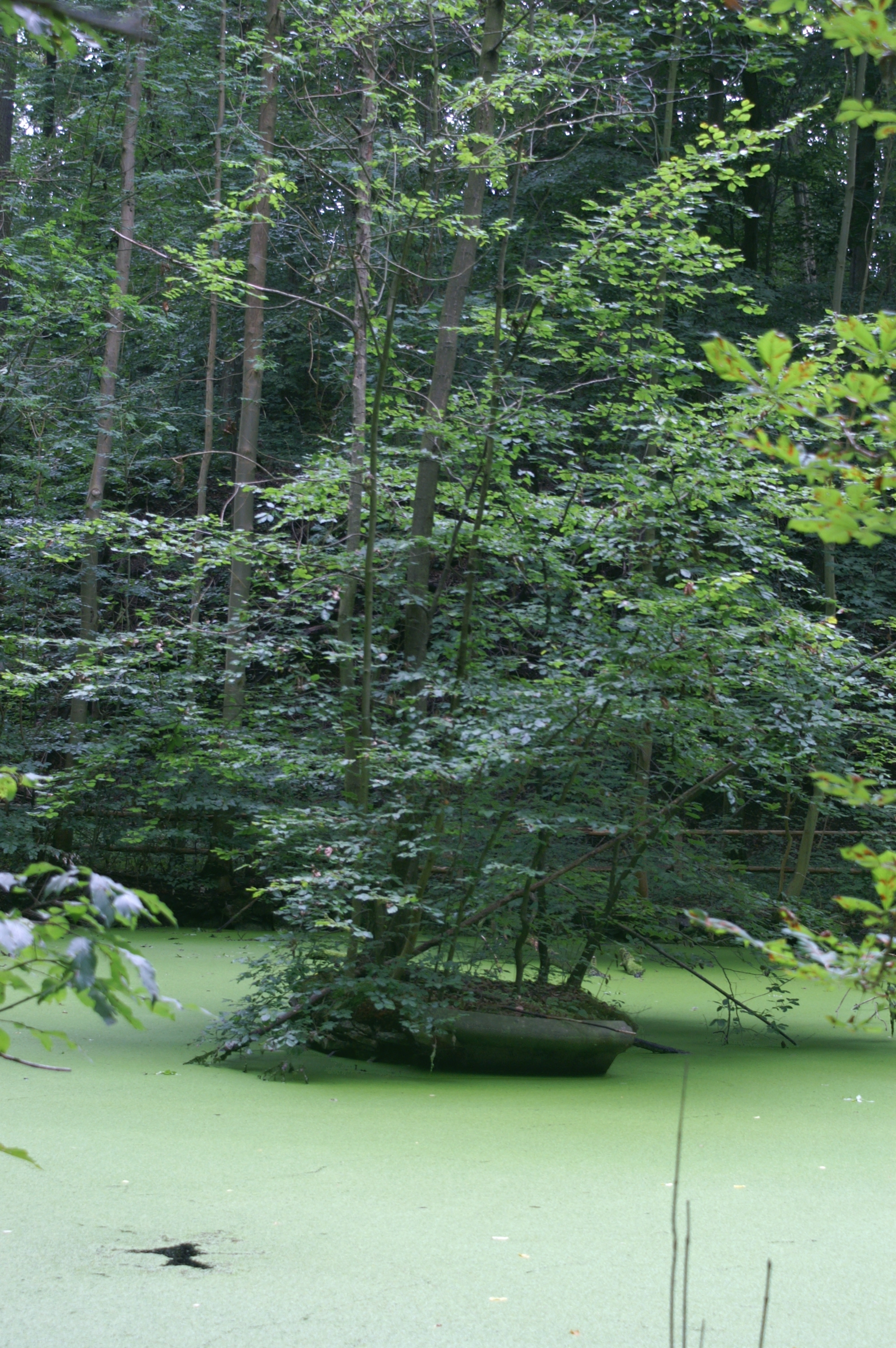 Teich im ehemaligen Schlosspark Lanke